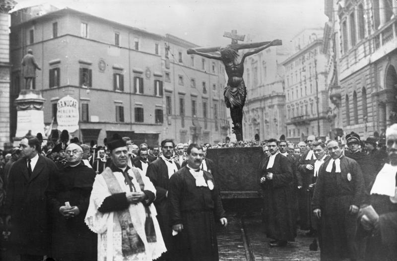 Eine Fest-Prozession mit dem Kreuz der Kirche des Heiligen Marcello in Rom! Alljährlichg findet in Italien seit der großen Pest im Jahre 1522 in Rom eine Bittprozession statt, bei welcher das Kreuz des Heiligen Marcello durch die Straßen getragen wird. Information added by Wikimedia users.* Processione con il crocifisso della chiesa di San Marcello al Corso a Roma, nel 1931.